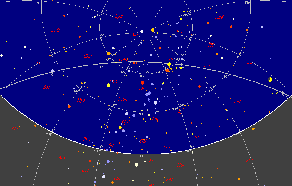 Immagine ottenuta con il software SkyMap v 11. Mostra il cielo notturno visibile da una località dell'Italia settentrionale alle ore 0 UTC del 21 dicembre 2012 per un osservatore che guarda verso sud. Il campo abbracciato è di 130°. E' tracciata l'eclittica in prossimità della quale si notano: Giove, Urano e la Luna.